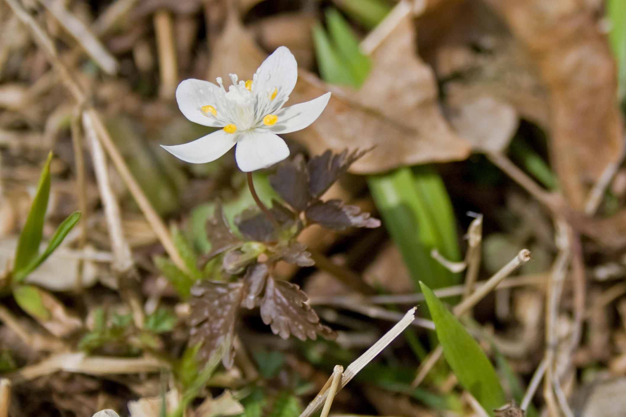 ツルシロカネソウ (学名:Dichocarpum stoloniferum)